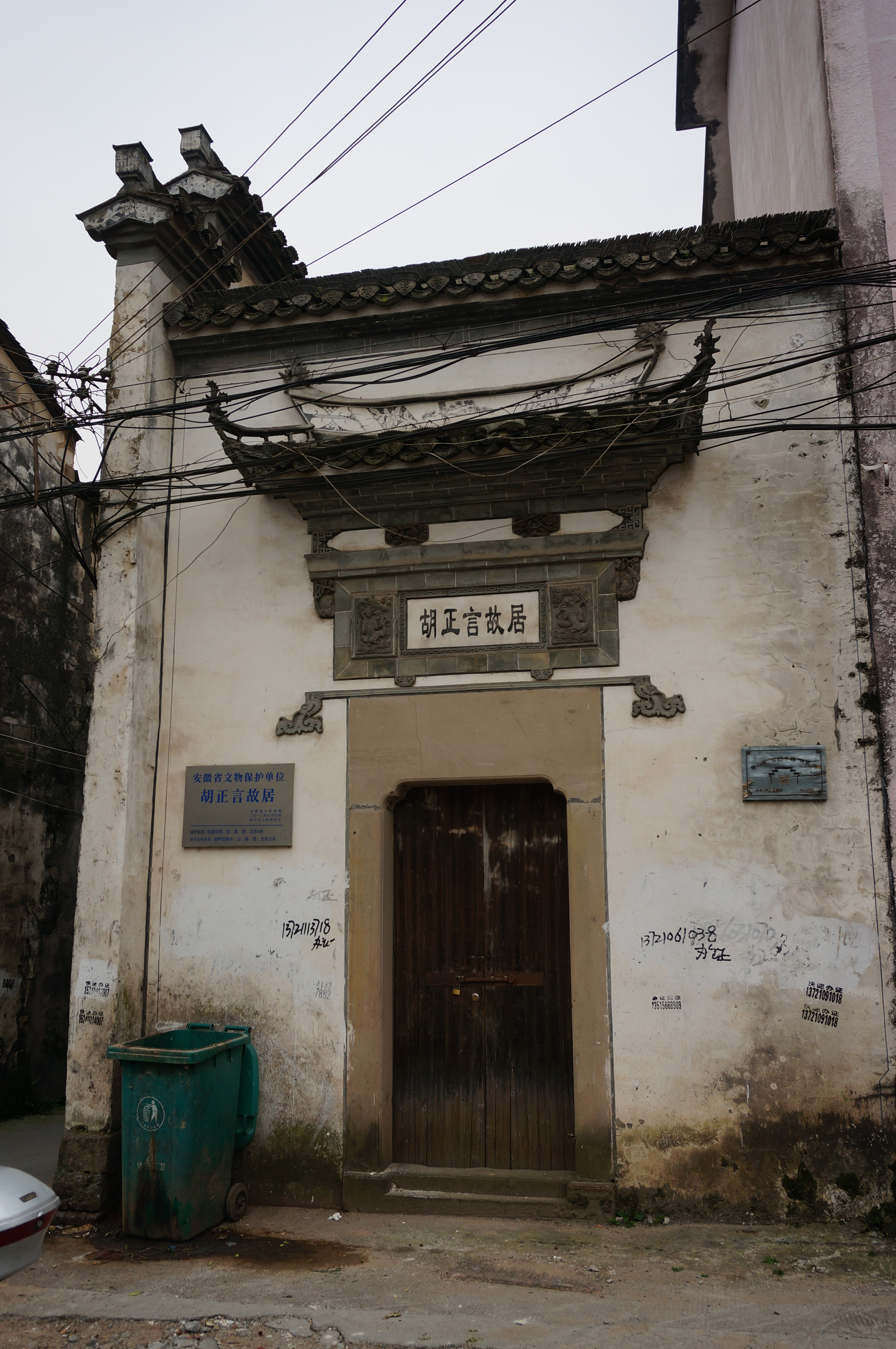 休宁胡正言故居，大门。